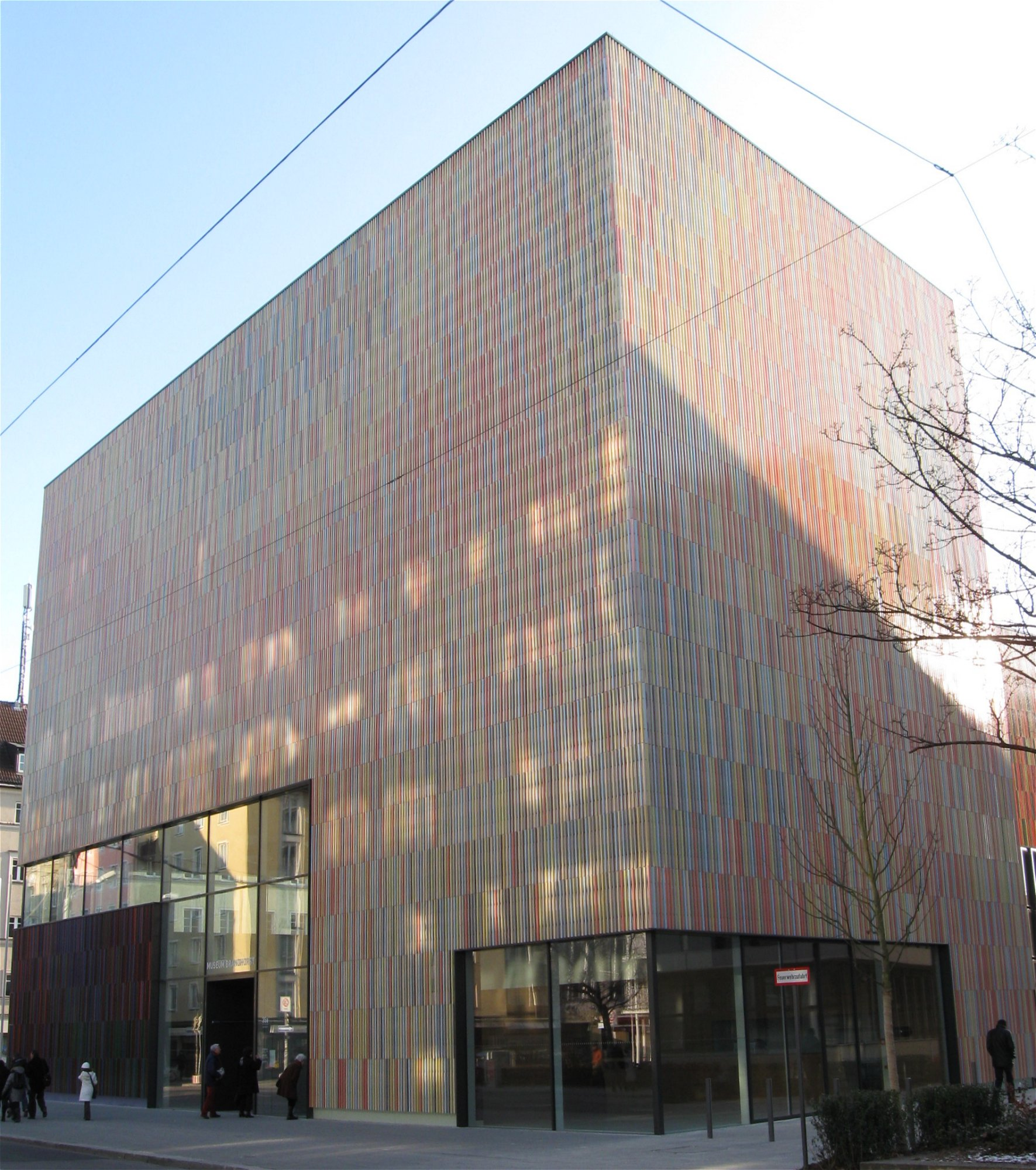 Museum Brandhorst, Muenchen, kurz vor der Eröffnung